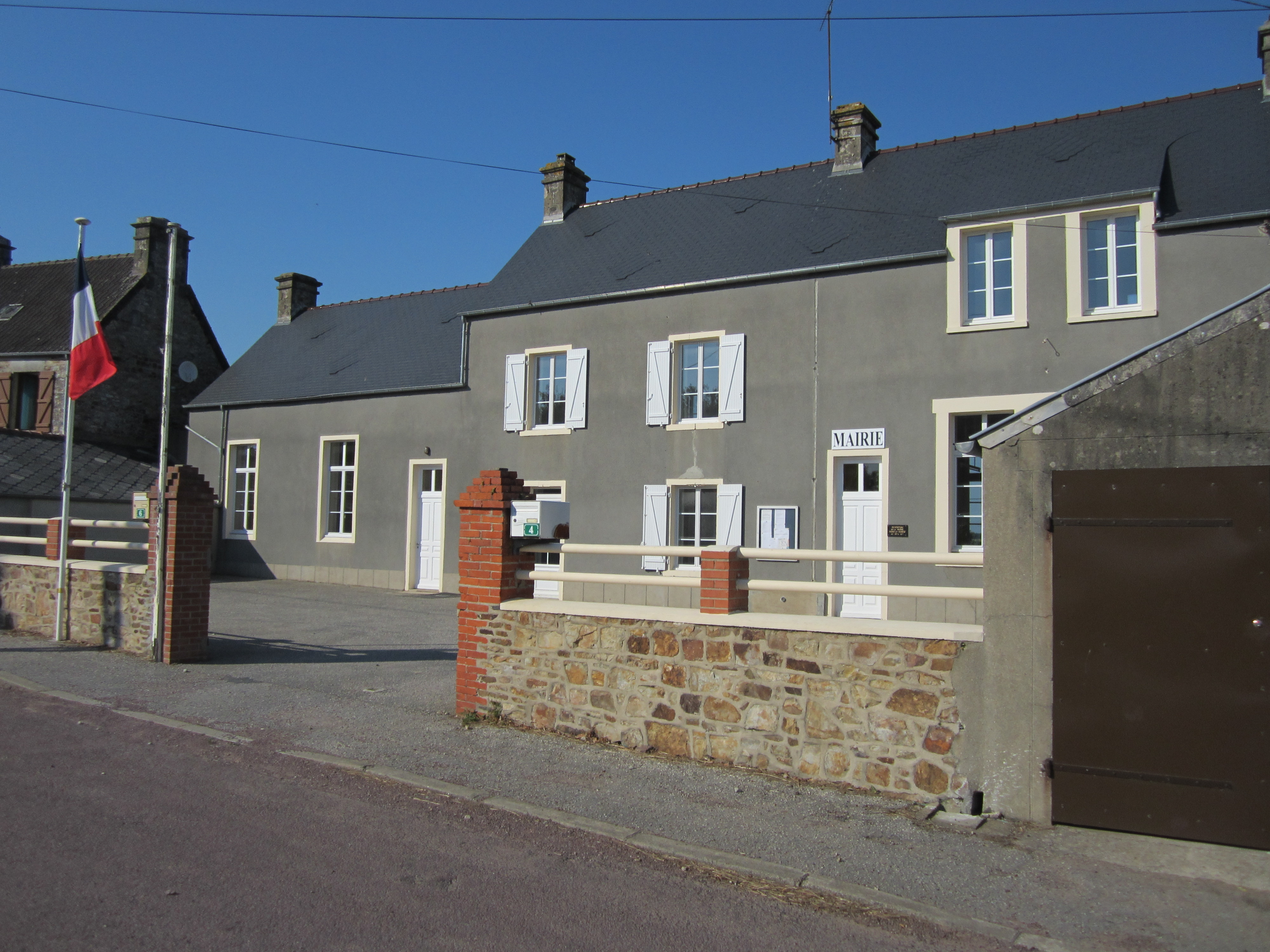 Fierville-les-Mines, Manche